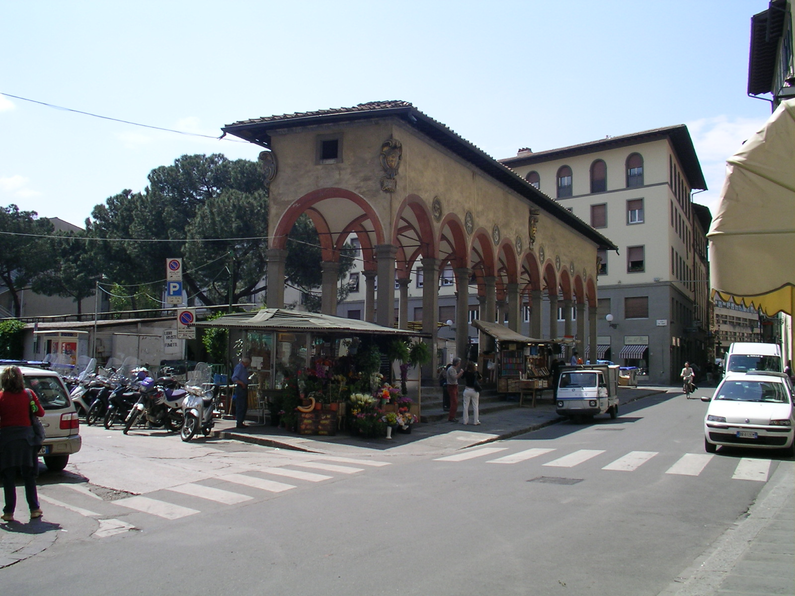 Ciompi Square and Loggia, in Florence, Italy